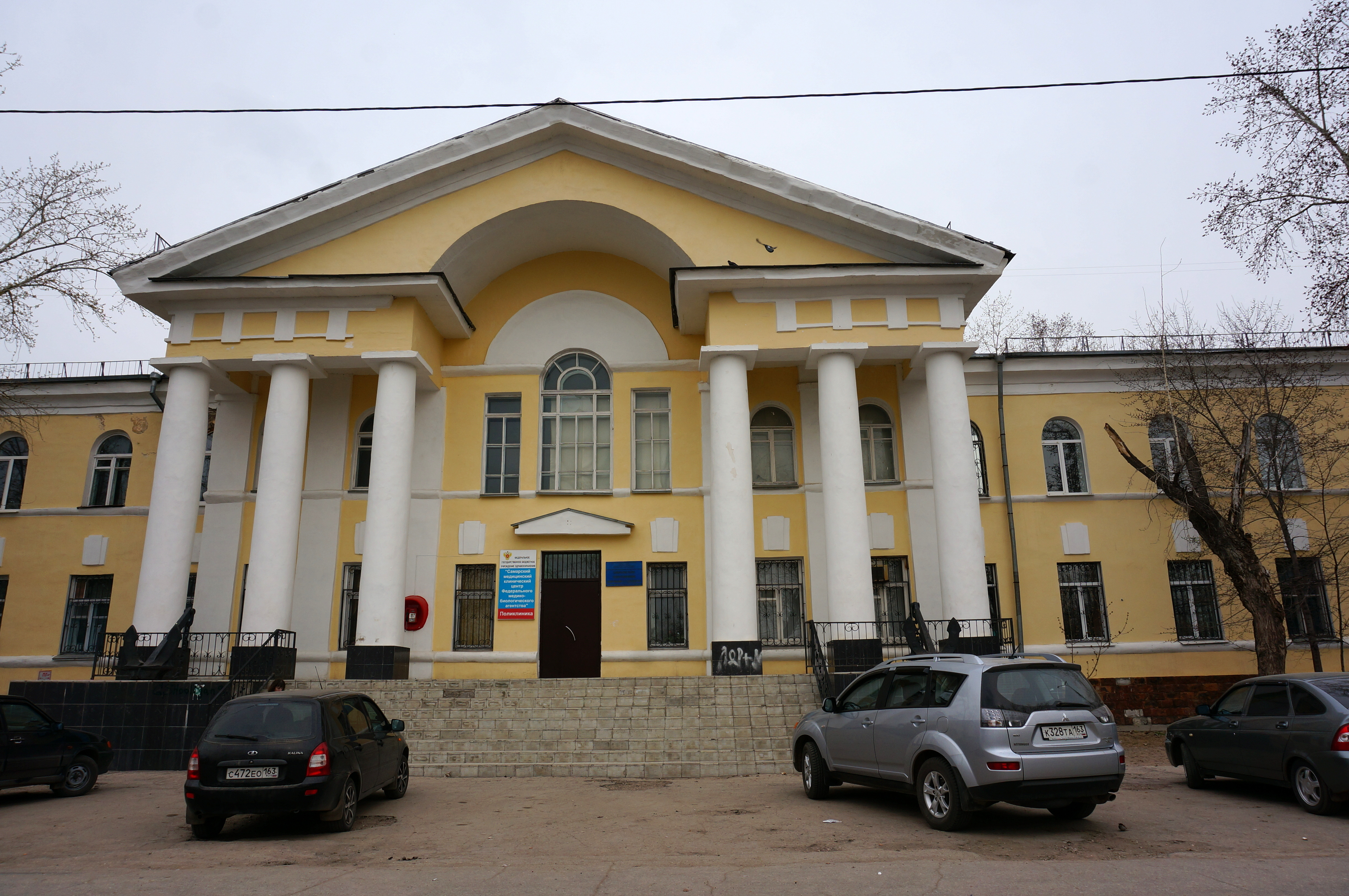 Ул. Носова 11, Тольятти, Россия. Здание по адресу Носова 11 построено в 1961 году для размещения управления шлюзов. Позже часть здания была передана под больницу. Построено в стиле советского классицизма. Здание П-образной формы, кирпичное, двухэтажное. Вход предваряют высокая лестница и выступающий фронтон с 6 колоннами и аркой. Окна второго этажа выполнены в виде арок